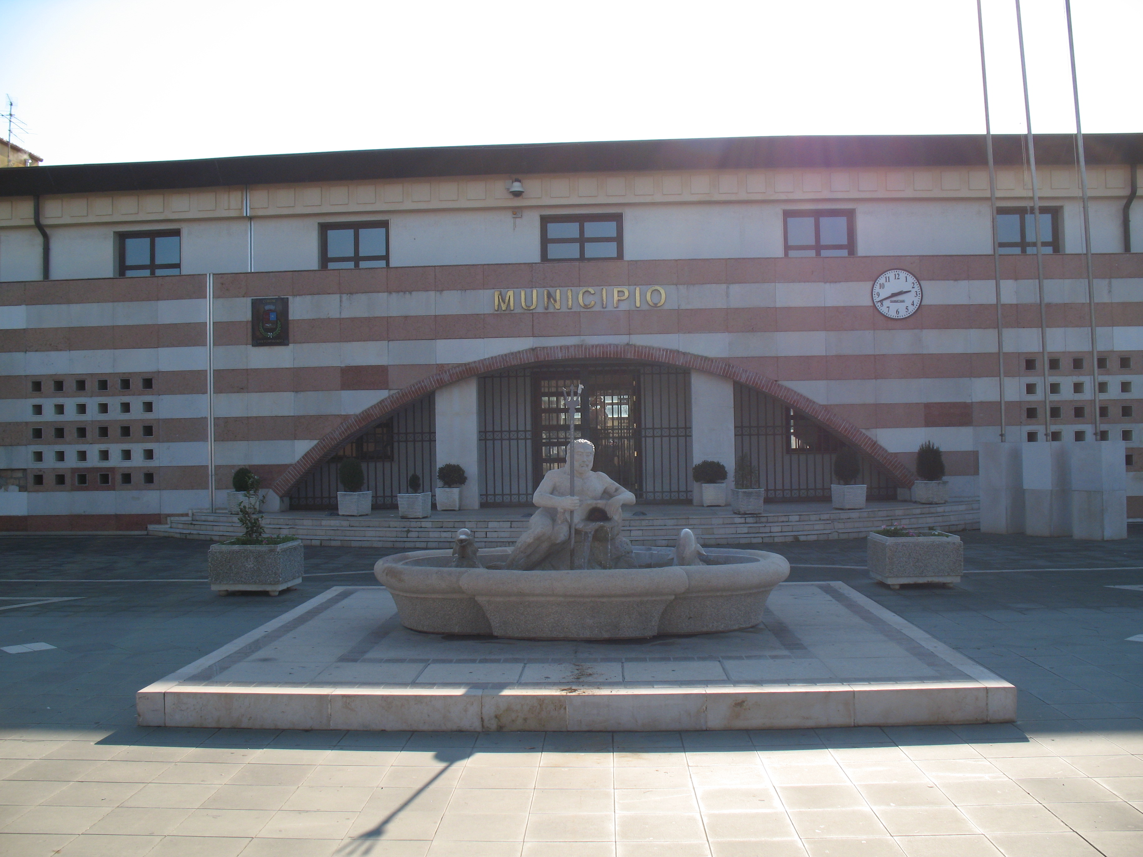 San Ferdinando, municipio